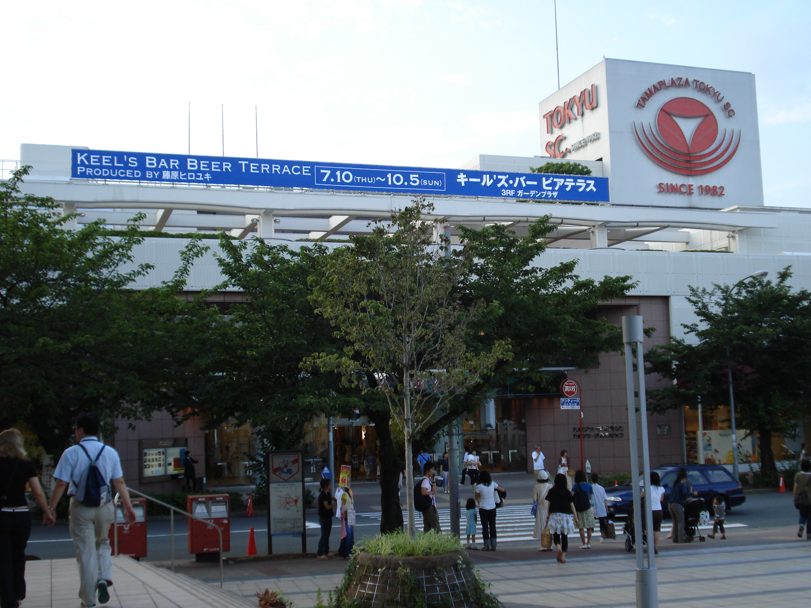 Tokyu SC